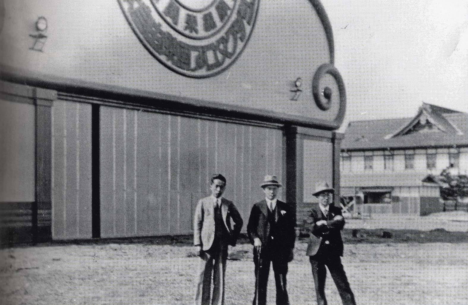 阪妻妻三郎プロダクションこと大日本自由映画プロダクション。